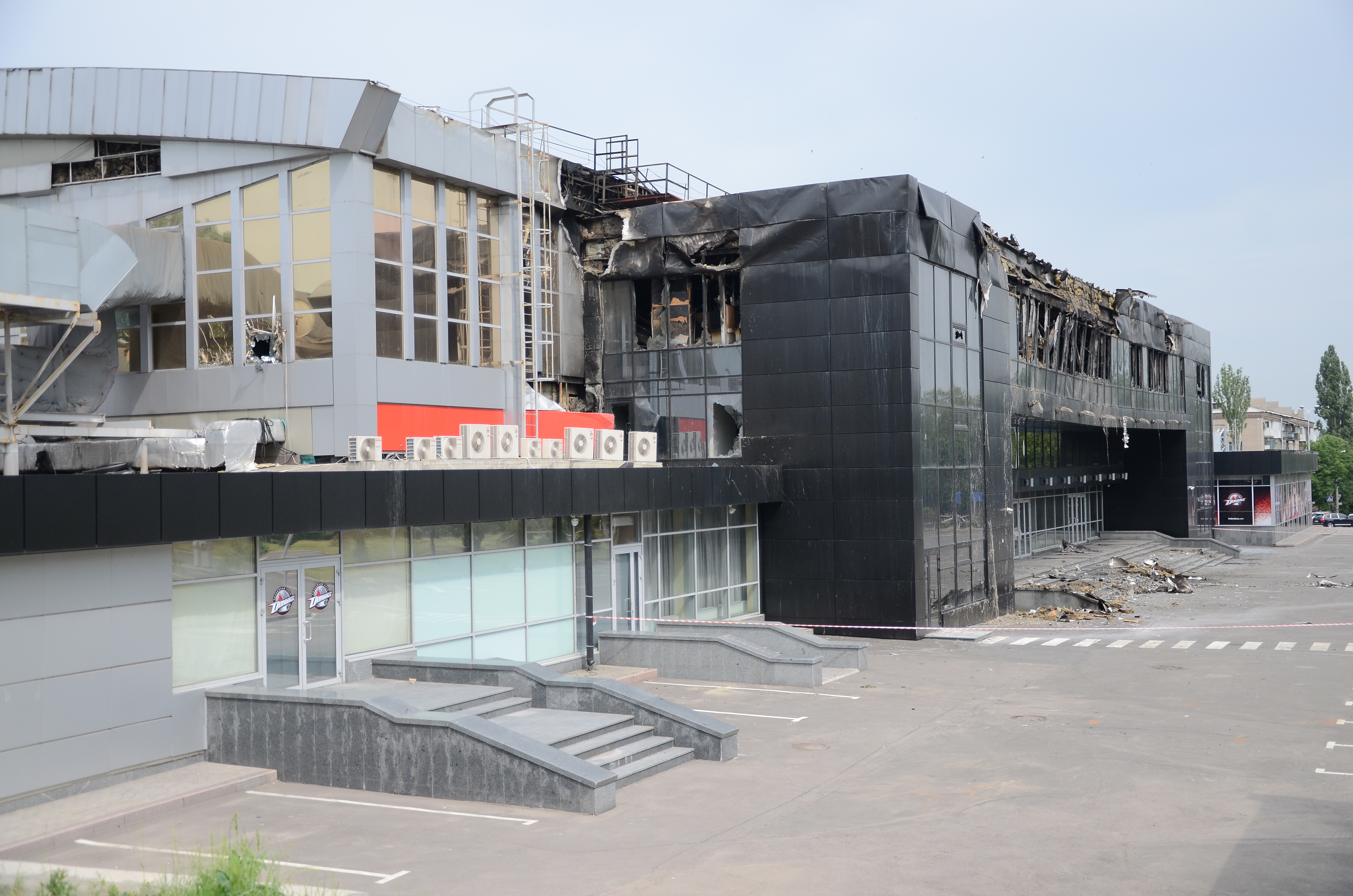 Донецк